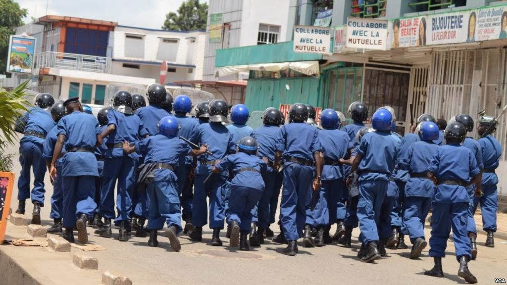 Des policiers burundais pourchassent des manifestants qui protestent contre un 3e mandat du président Pierre Nkurunziza, vendredi 17 avril 2015.